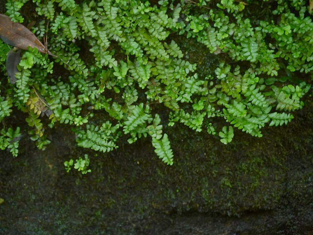 Lindasea japonica：サイゴクホングウシダ 2015/08/15 和歌山県田辺市：Tanabe City. Wakayama Pref. Japan